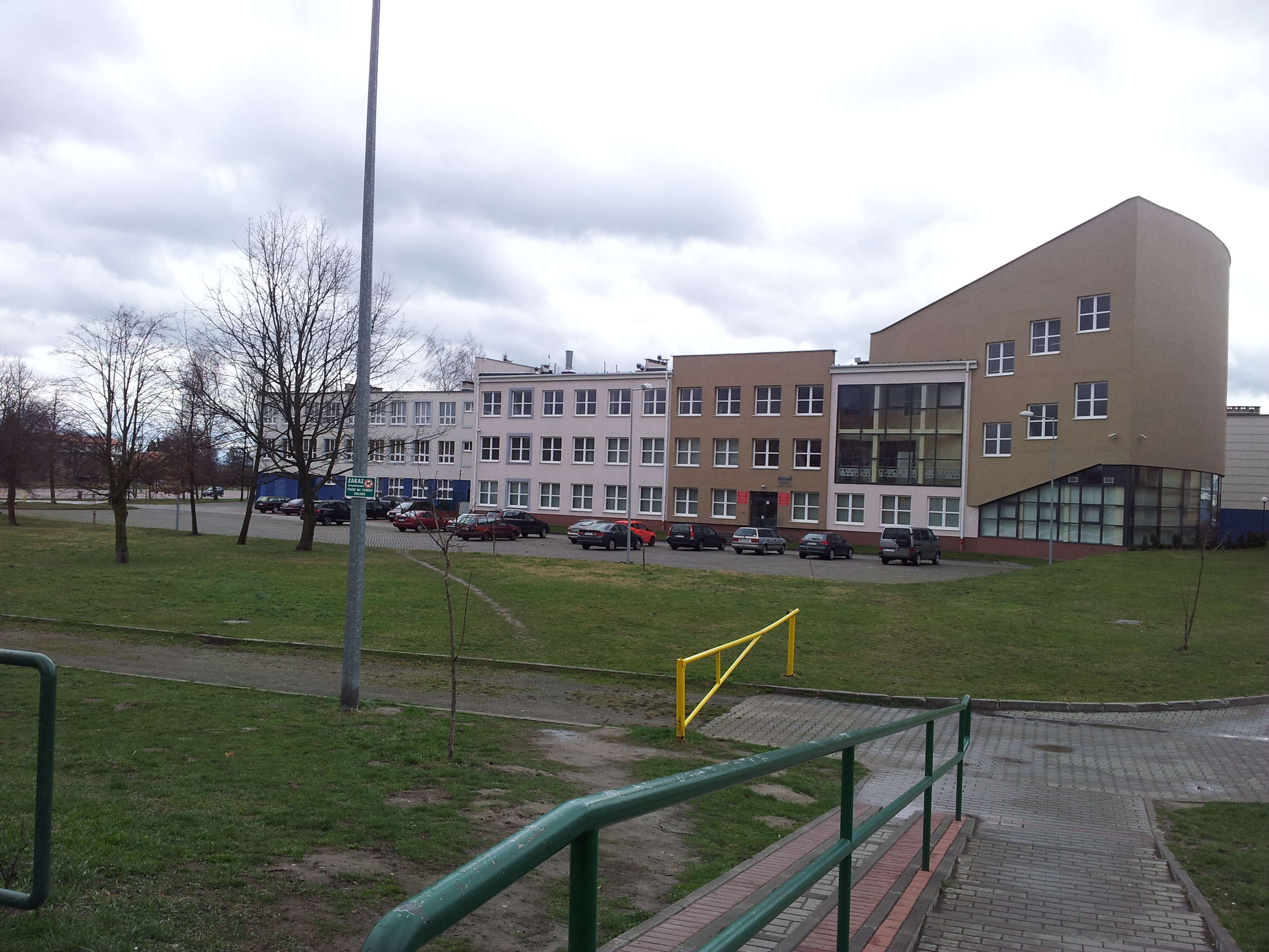 Budynek Instytutu Politechnicznego oraz Instytutu Ekonomicznego Państwowej Wyższej Szkoły Zawodowej w Elblągu